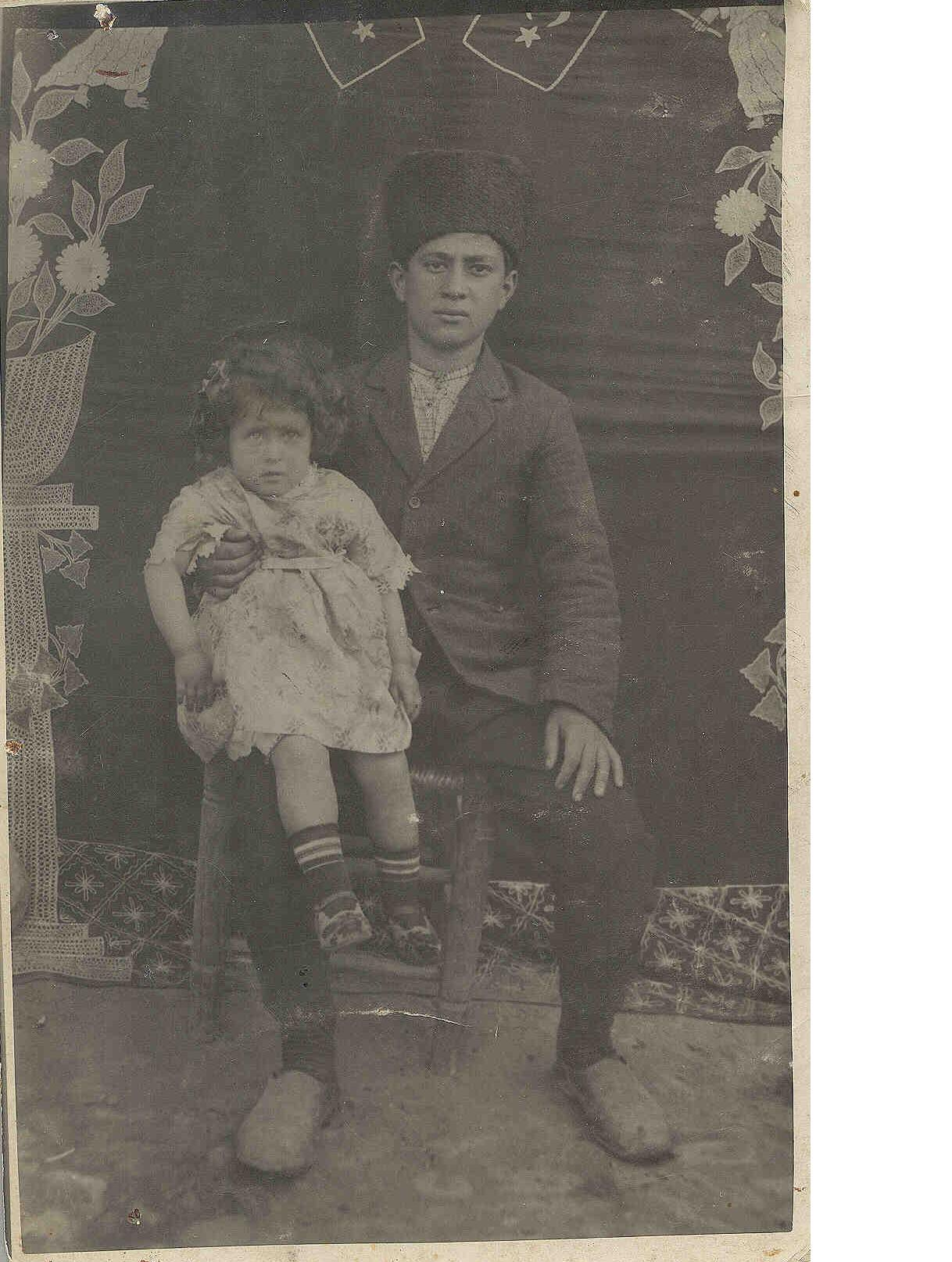 Necati Çelim 1920'ler